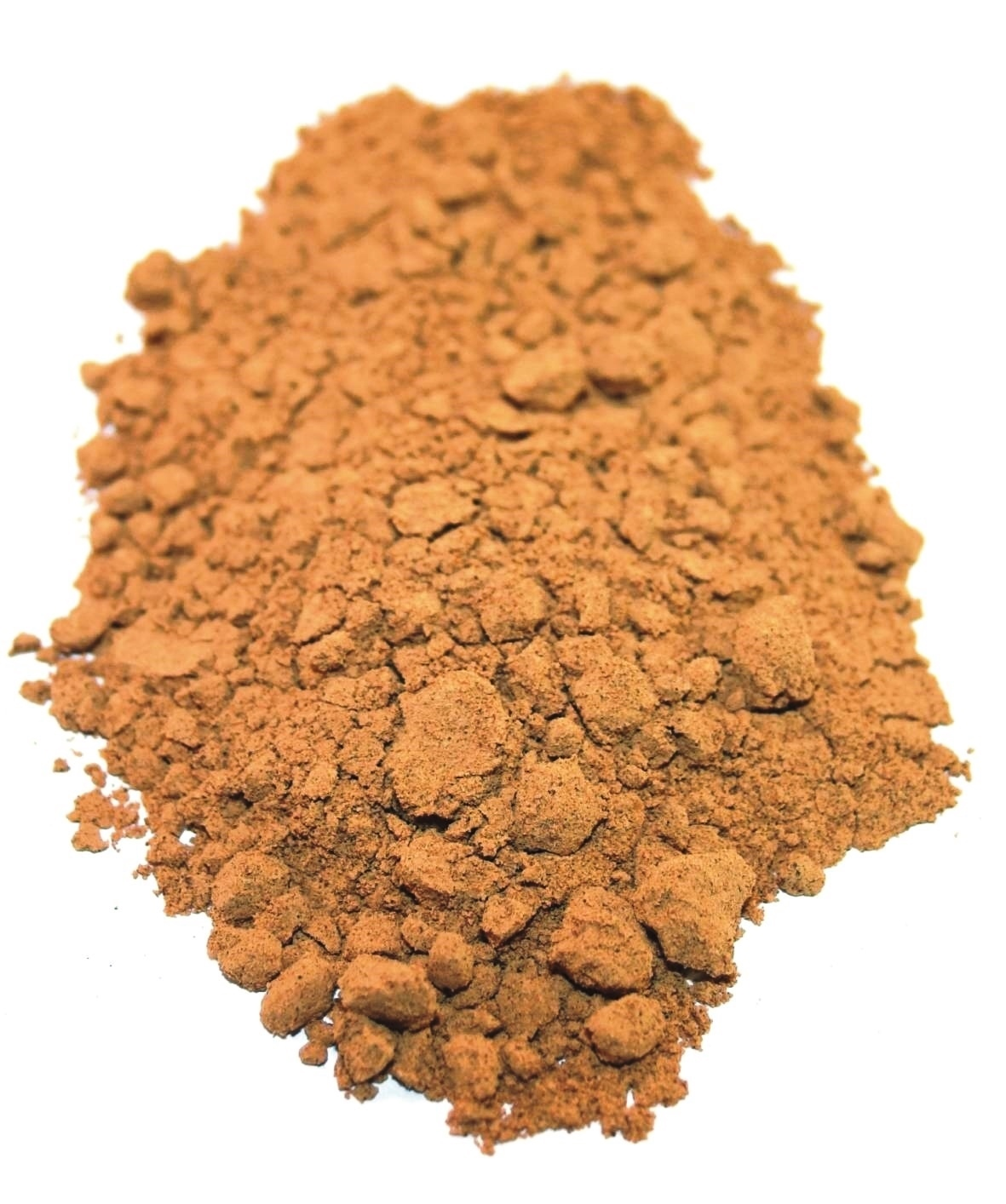 Hierbei handelt es sich um 100% reines und frisch vermahlenes Guaranapulver.